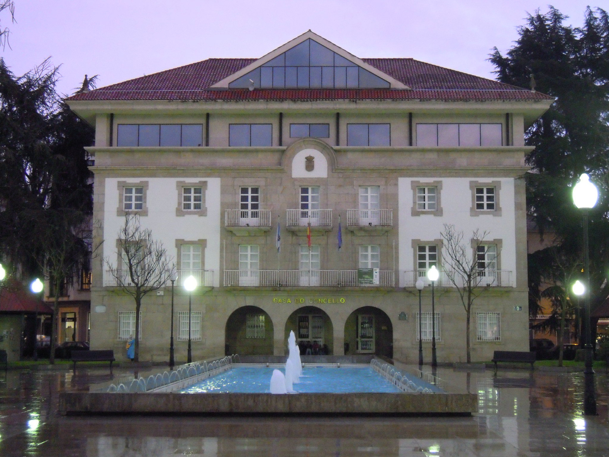 Hôtel de ville de Verín en Galice (Espagne)